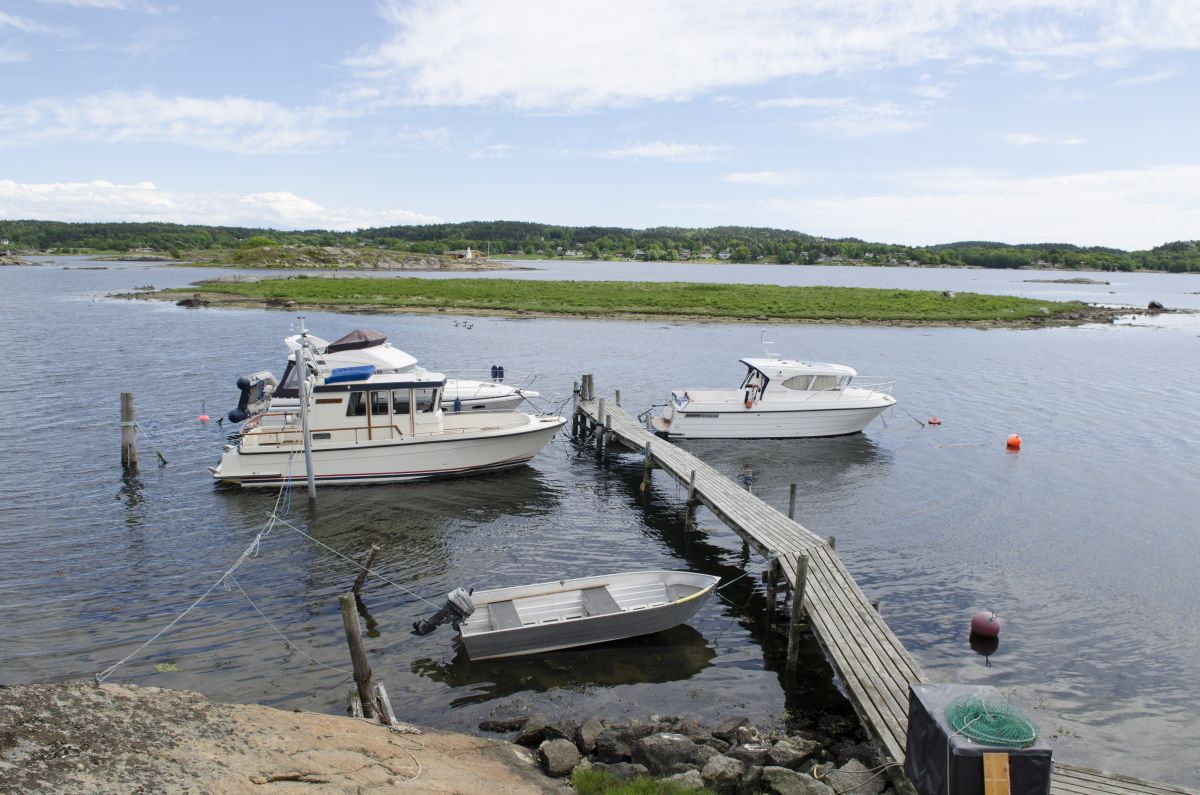 Flatholmen er en lav, grønnkledt holme tett ved brygger og hytteområder på Kaupang.